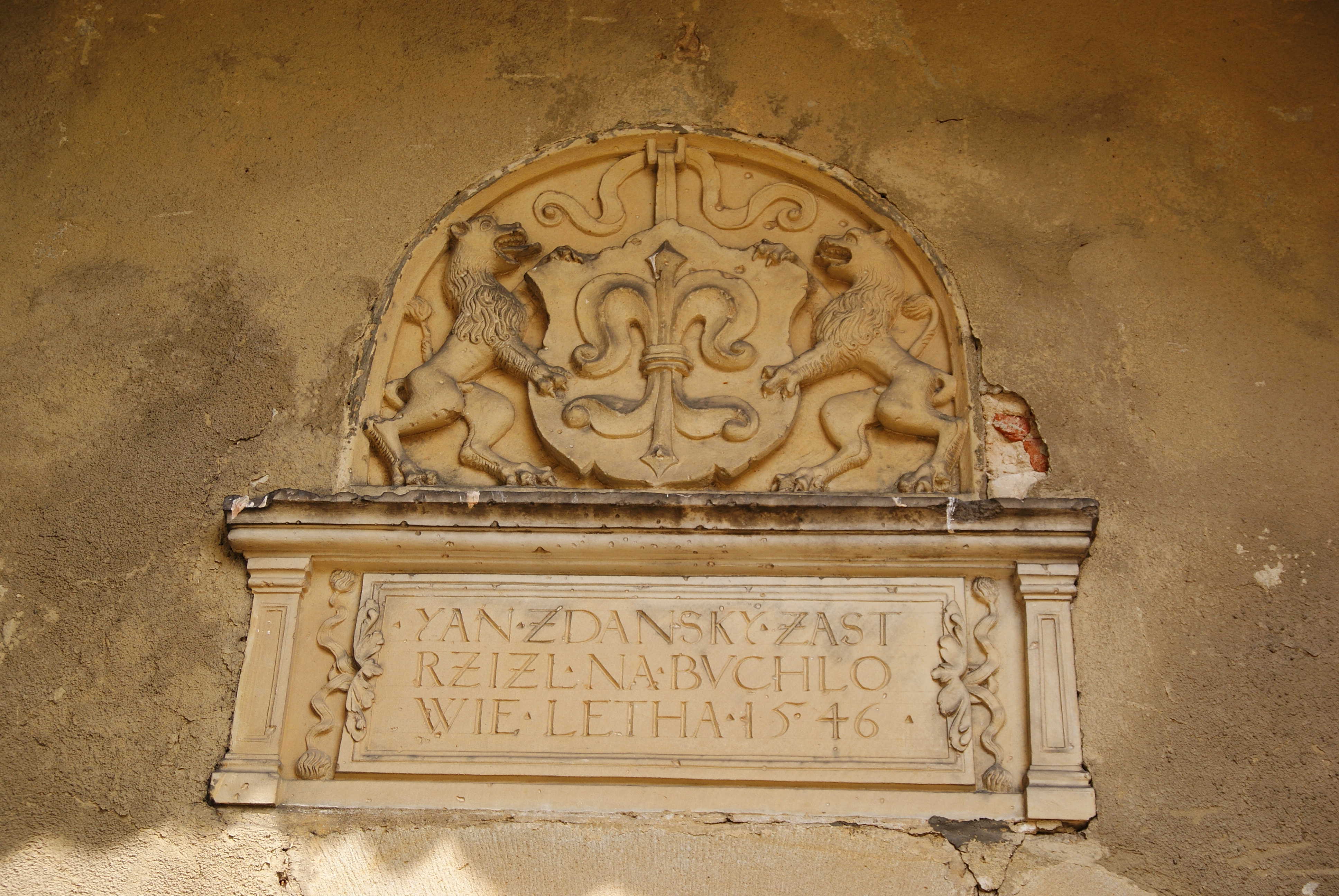 Hrad Buchlov (Chrastě), SZ od města 418, Chrastě